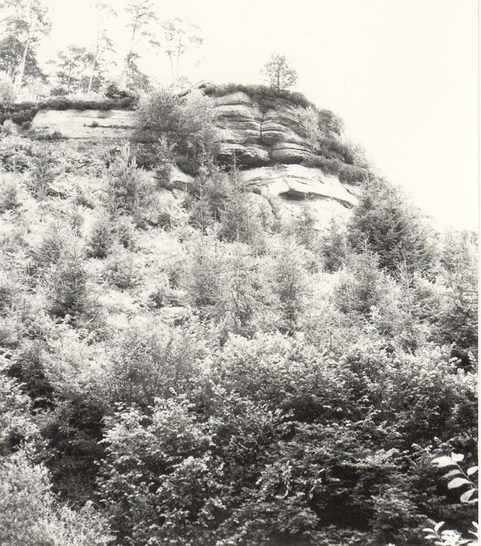 Les Roches du Mulot à Bleurville (Vosges)